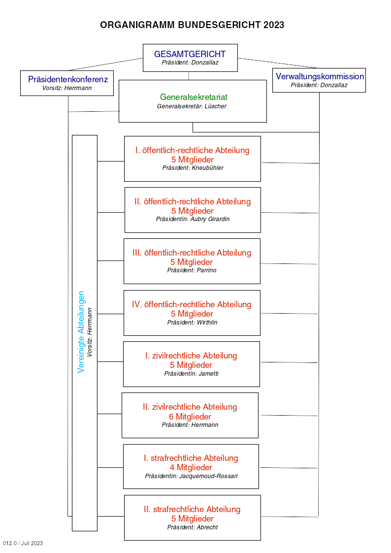 Organigramm 2020